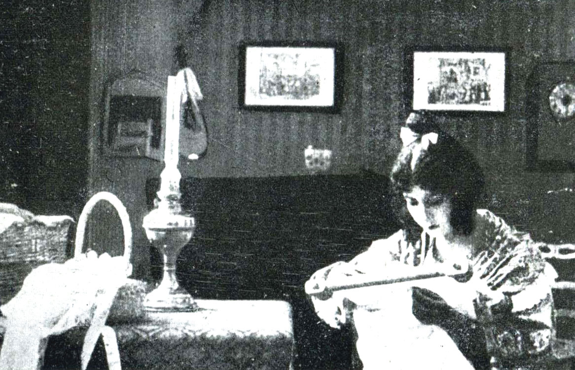 Leda Gys nella "Histoire d'un Pierrot". film muto 1914 (B. Negroni)